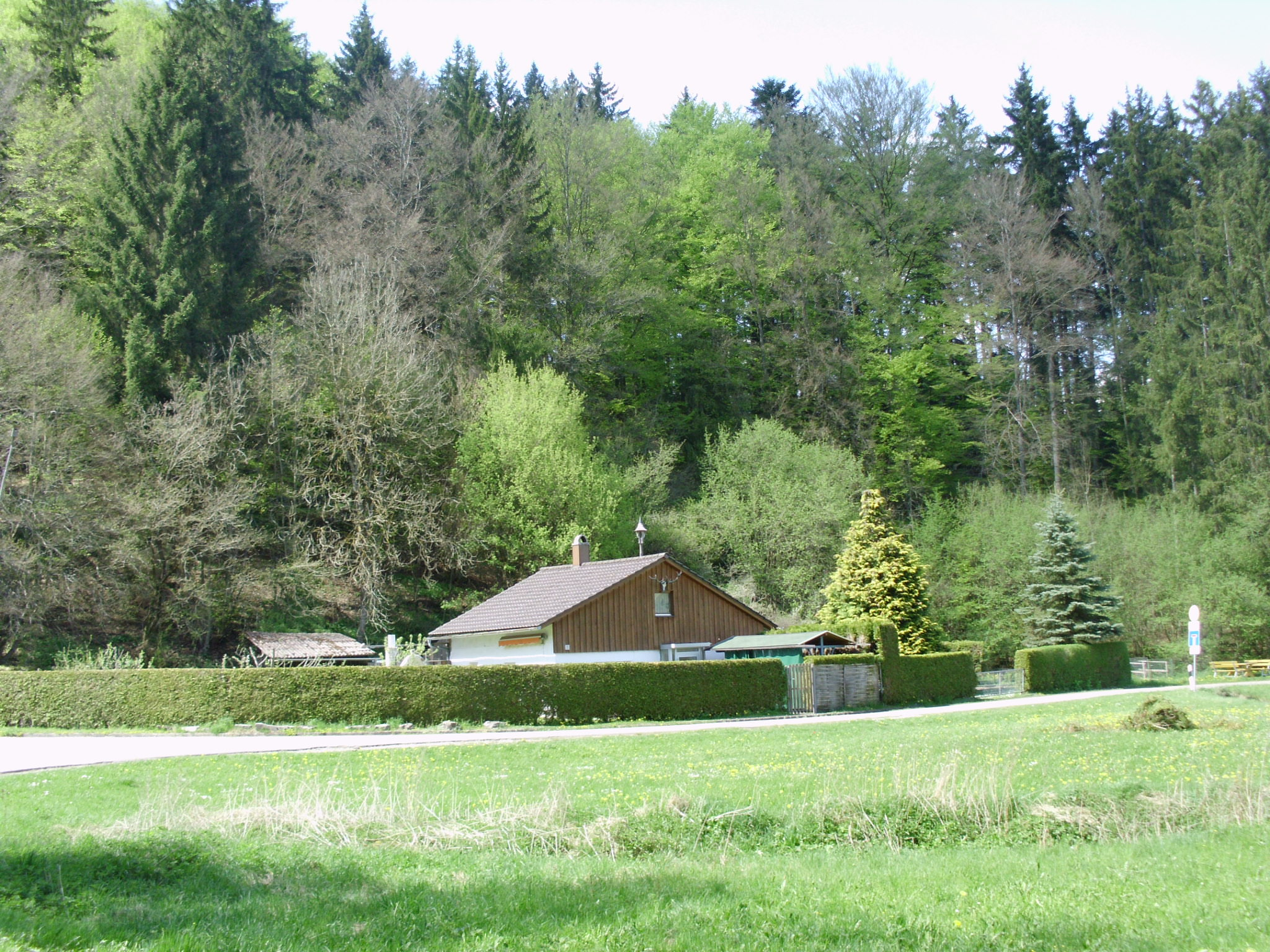 Erzwäsche, Ortsteil der Marktgemeinde Titting im oberbayerischen Landkreis Eichstätt